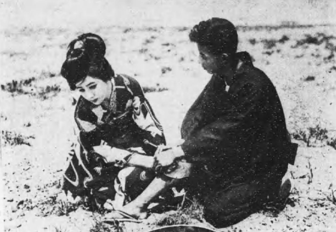 澤 蘭子（さわ らんこ、1903年7月25日 - 2003年1月11日）は、日本の女優である。この写真は『籠の鳥』のワンシーン。 (Ranko Sawa, 1903-2003. Actress from Japan.)